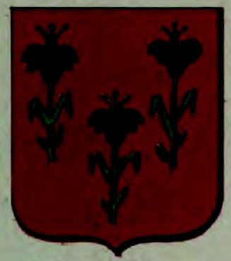 Blason du collège des Grassins